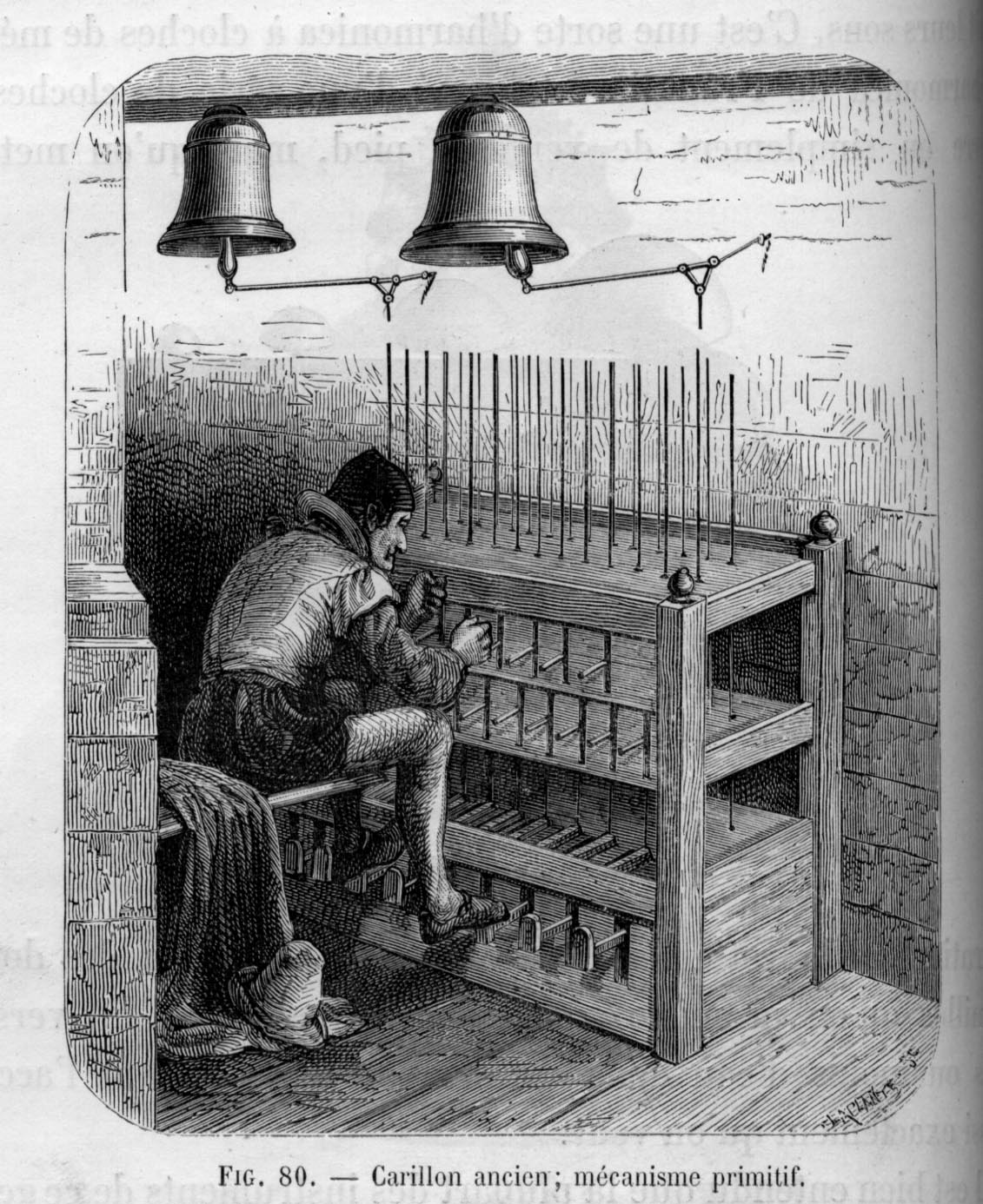 Le Carillonneur (Gravure Ancienne)